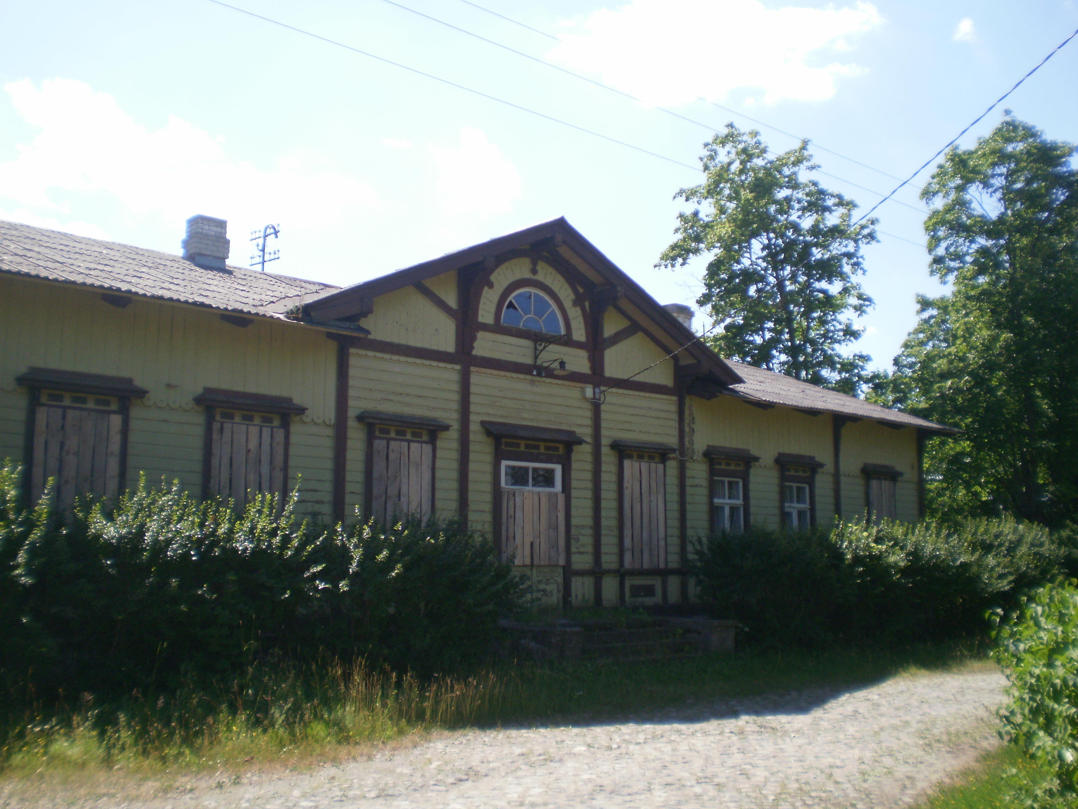 Risti raudteejaamahoone tagantvaates